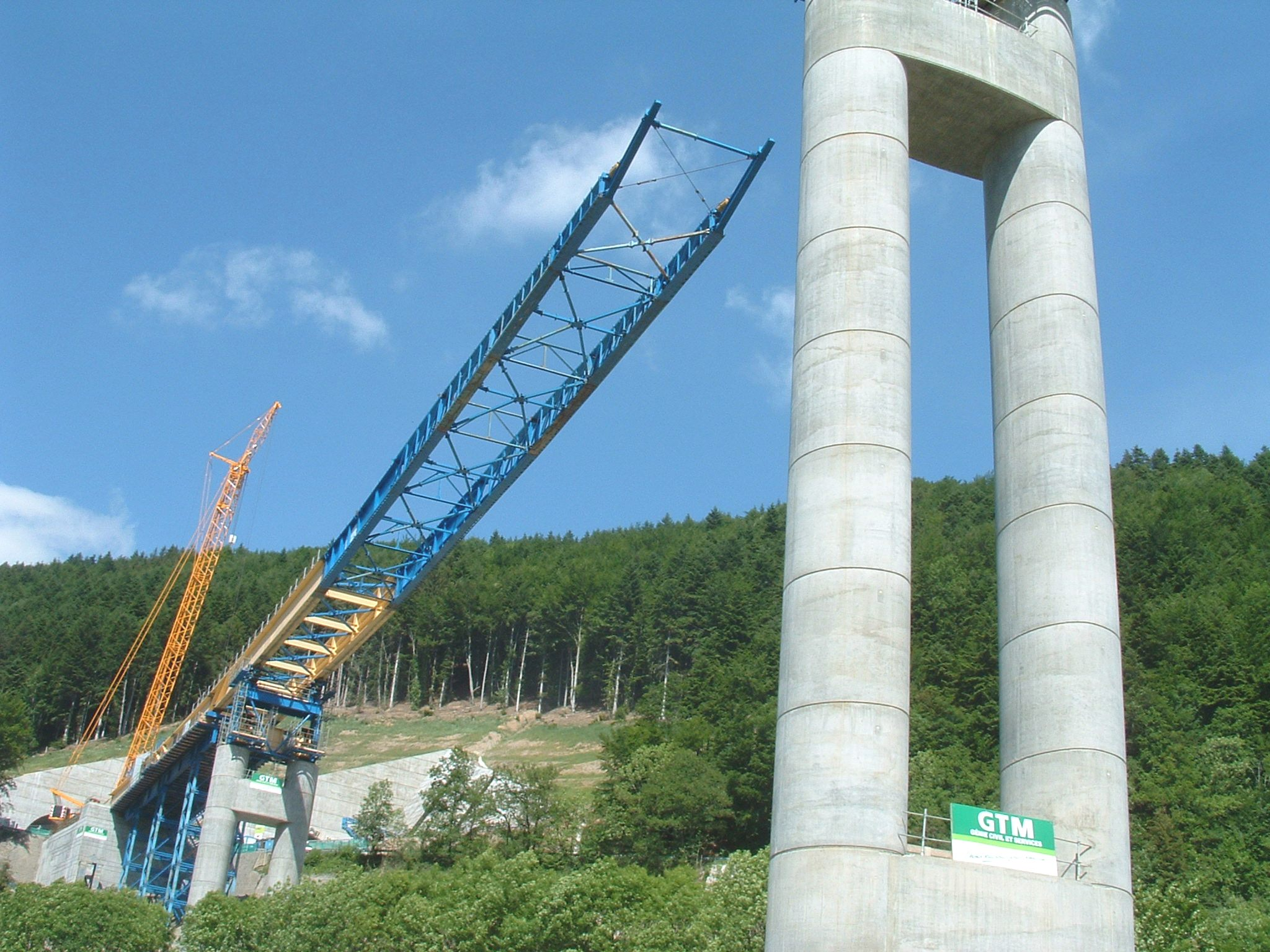 Viaduc de Monestier - Construction - Lancement de la charpente métallique du tablier vers le tunnel de Sinard